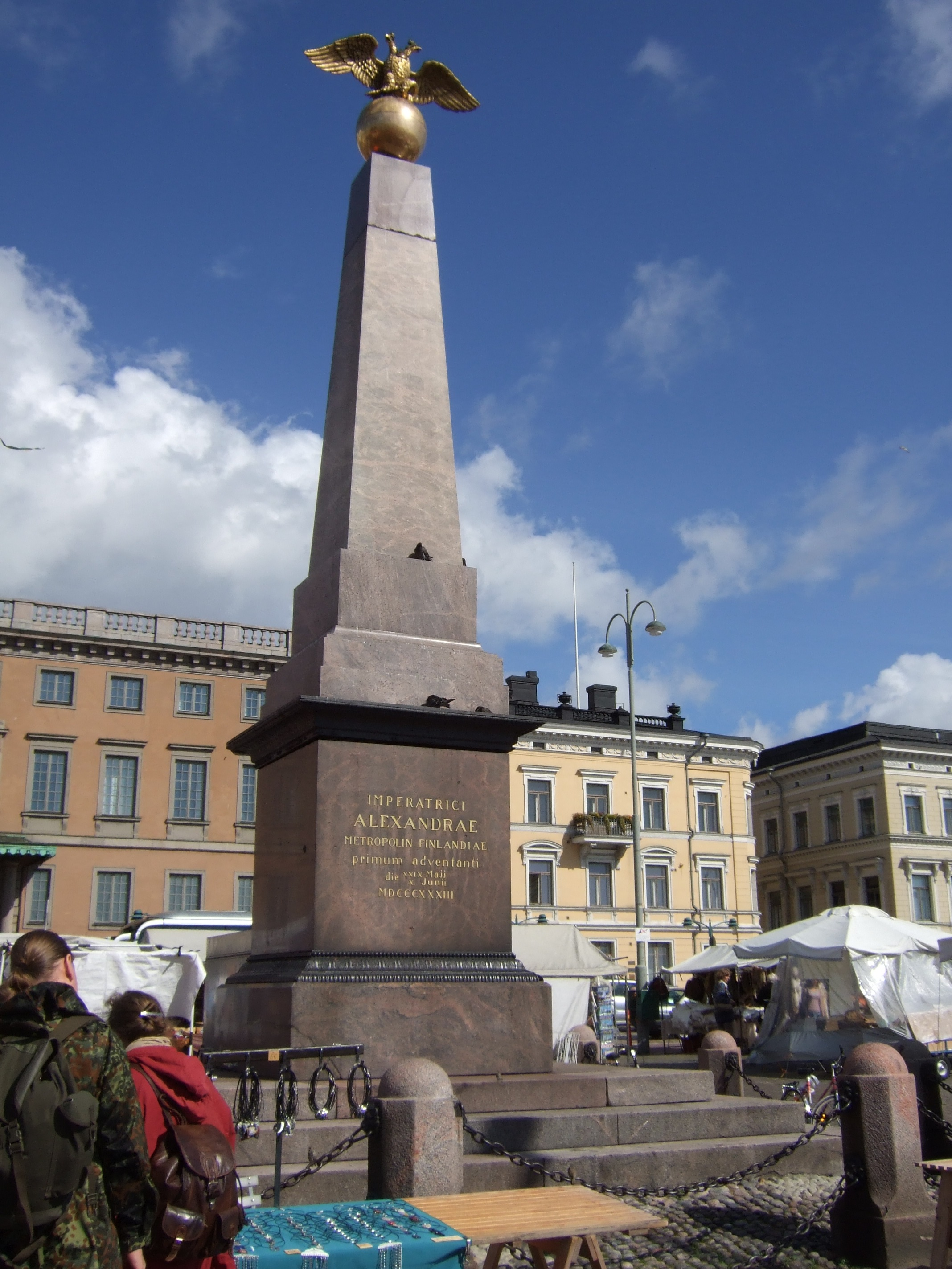 "Stein der Zarin" auf dem Marktplatz von Helsinki